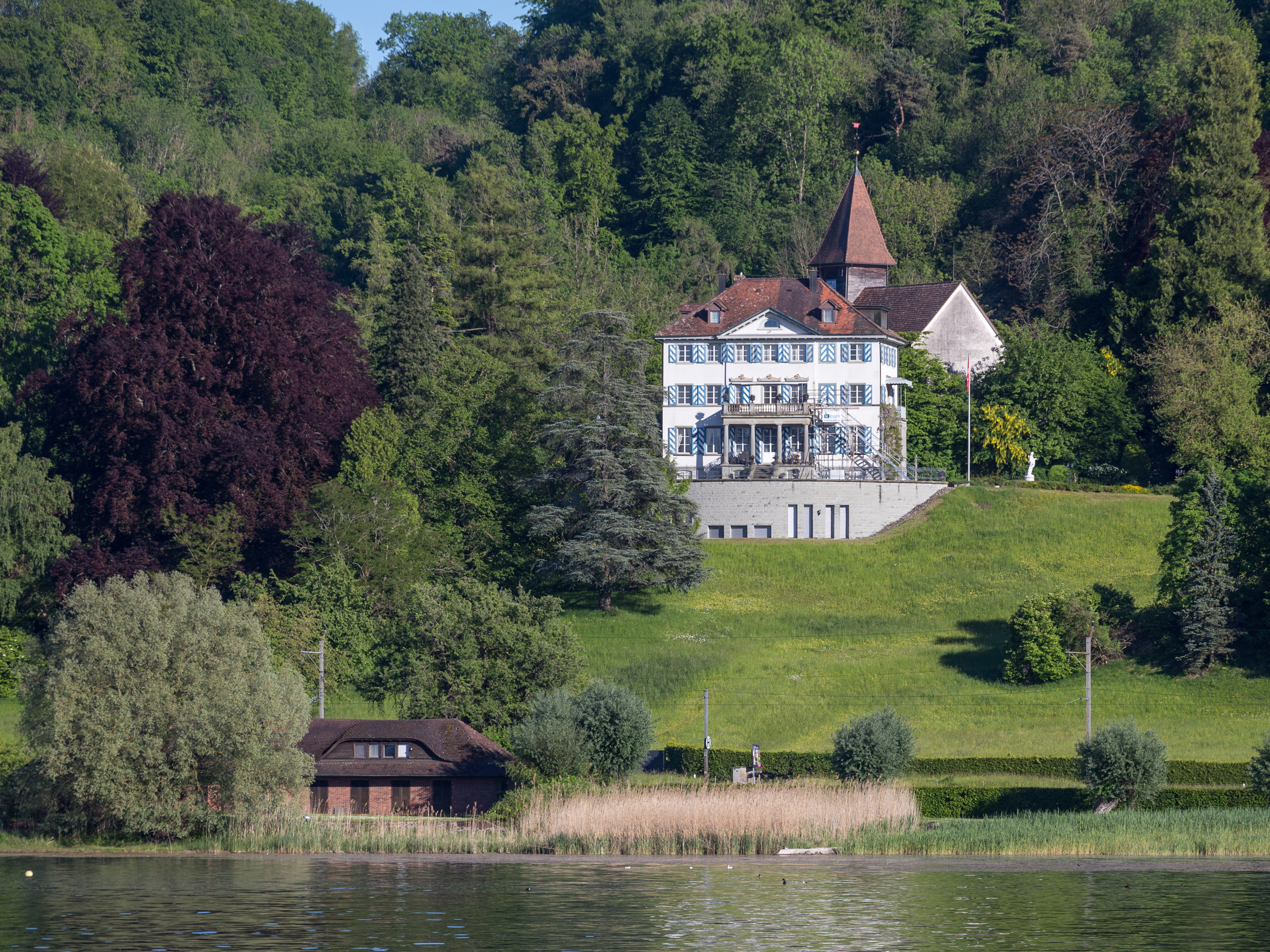 Schloss Louisenberg und Kapelle St. Aloysius, Mannenbach TG